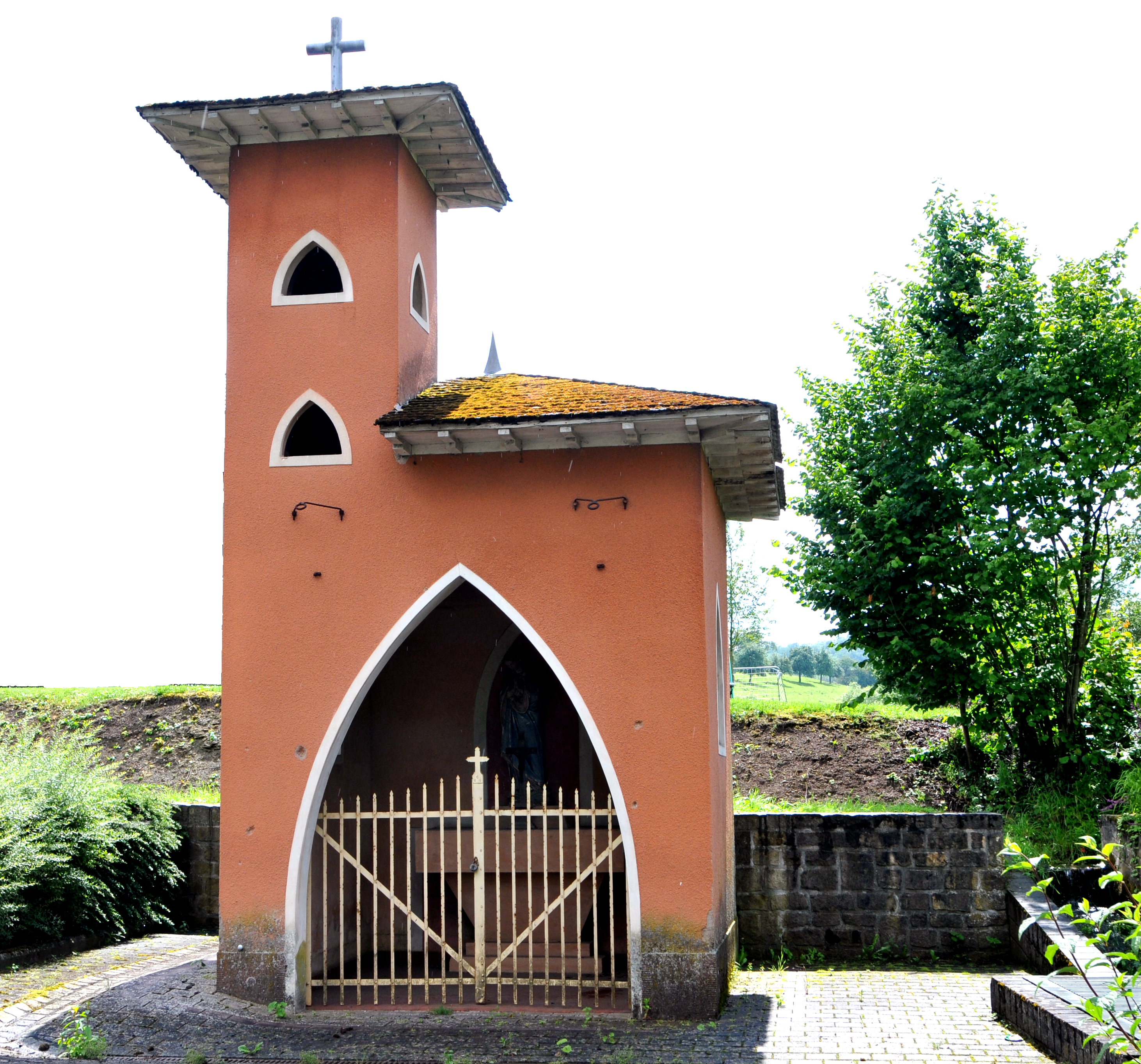 Eng Kapellchen zu Rolleng.